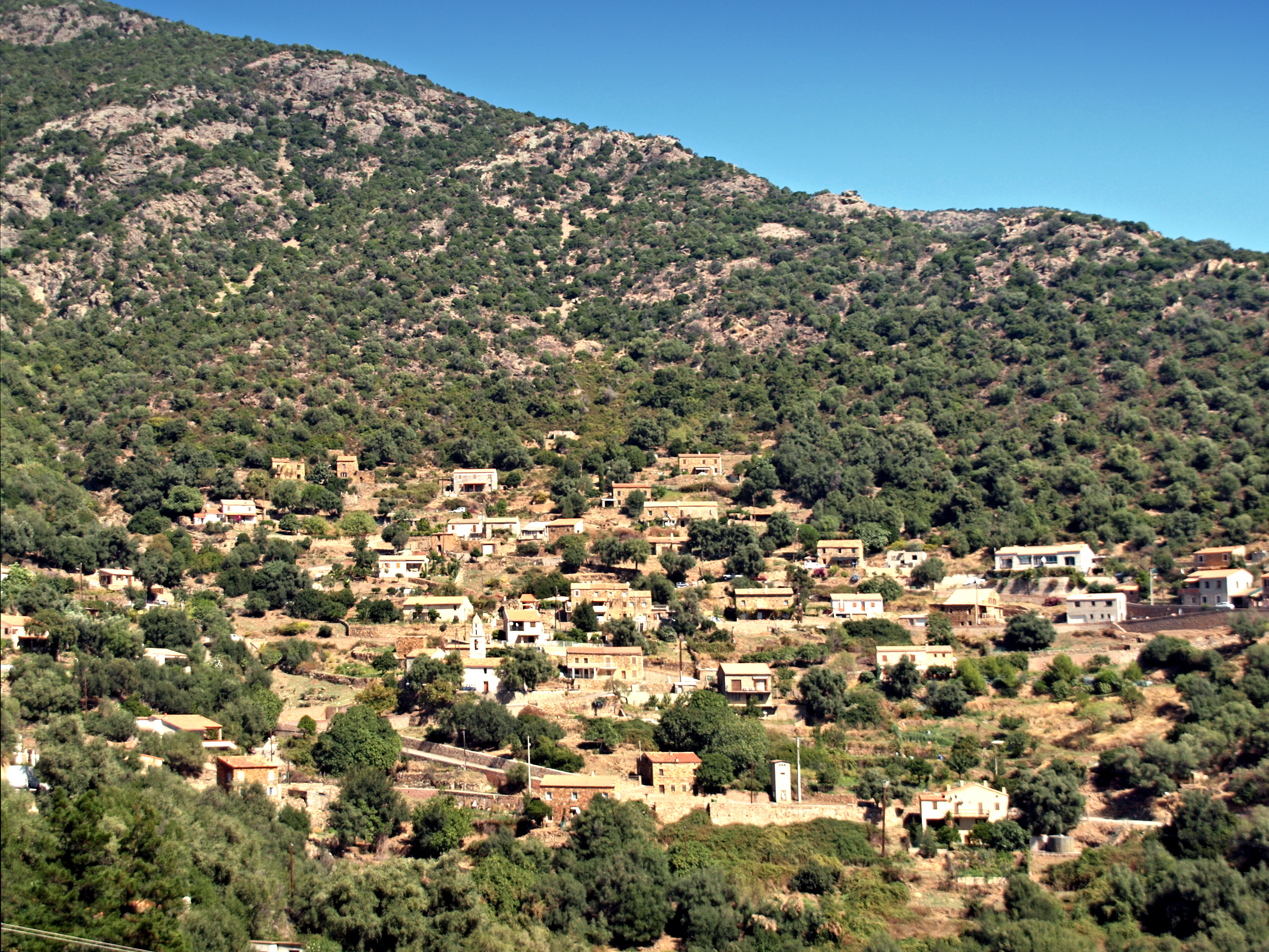 Osani (Corsica) - Vue de Curzu